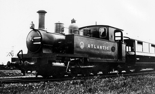 'Atlantic', the last locomotive built for the Campbeltown and Machrihanish Light Railway, Andrew Barclay 0-6-2T, builder's photograph, 1907